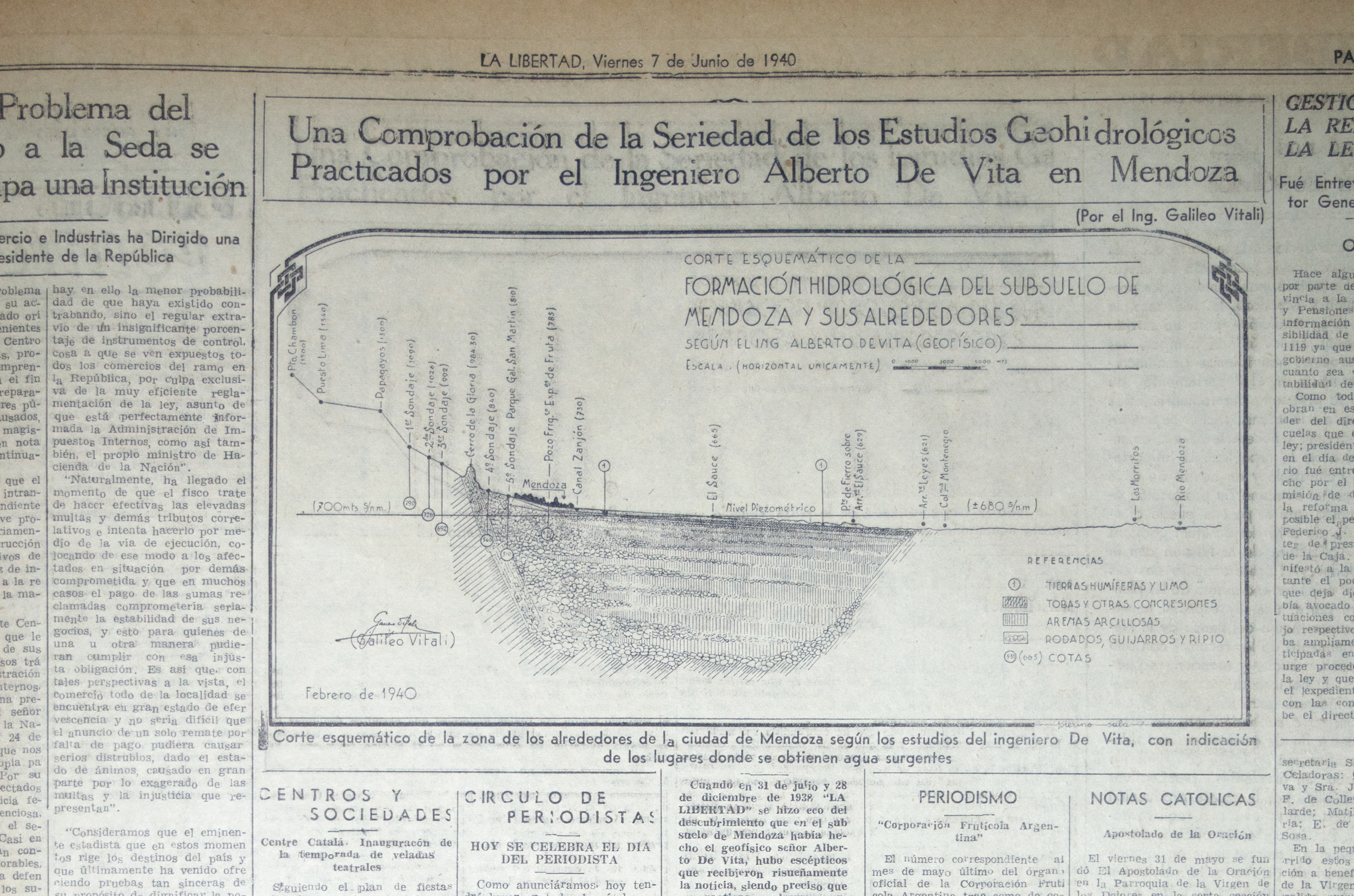 Fotografía de pagina de diario la libertad del 7 de junio de 1940 donde figura una nota escrita por Galileo Vitali